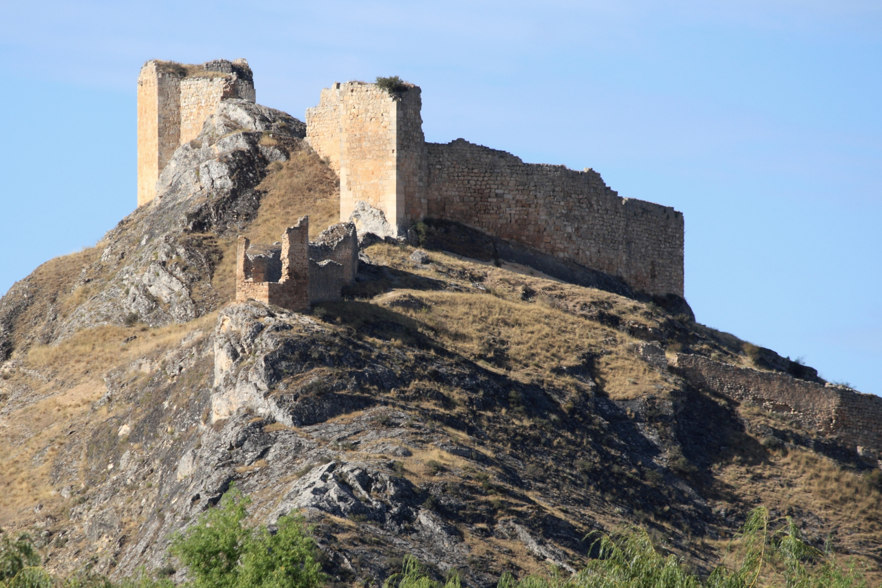 Castillo de Osma, fue construido entre los siglos X y XI y modificado entre los siglos XIV y XV. Se encuentra en un monte a las afueras de las localidades de de El Burgo de Osma y Ciudad de Osma Provincia de Soria Castilla y León España